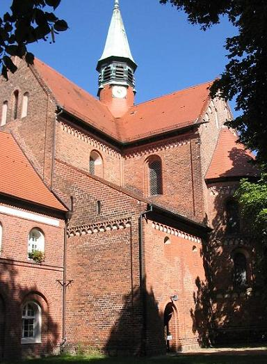 Klosterkirche Lehnin, Brandenburg.